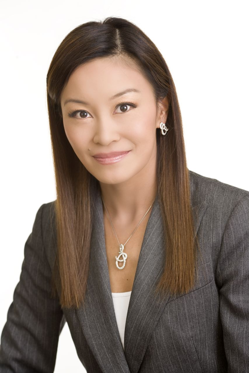 Jennifer Su, TV & Radio Presenter